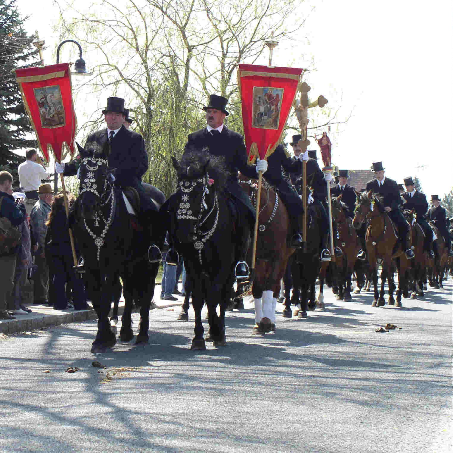 Budyscy křižerjo w Radworju